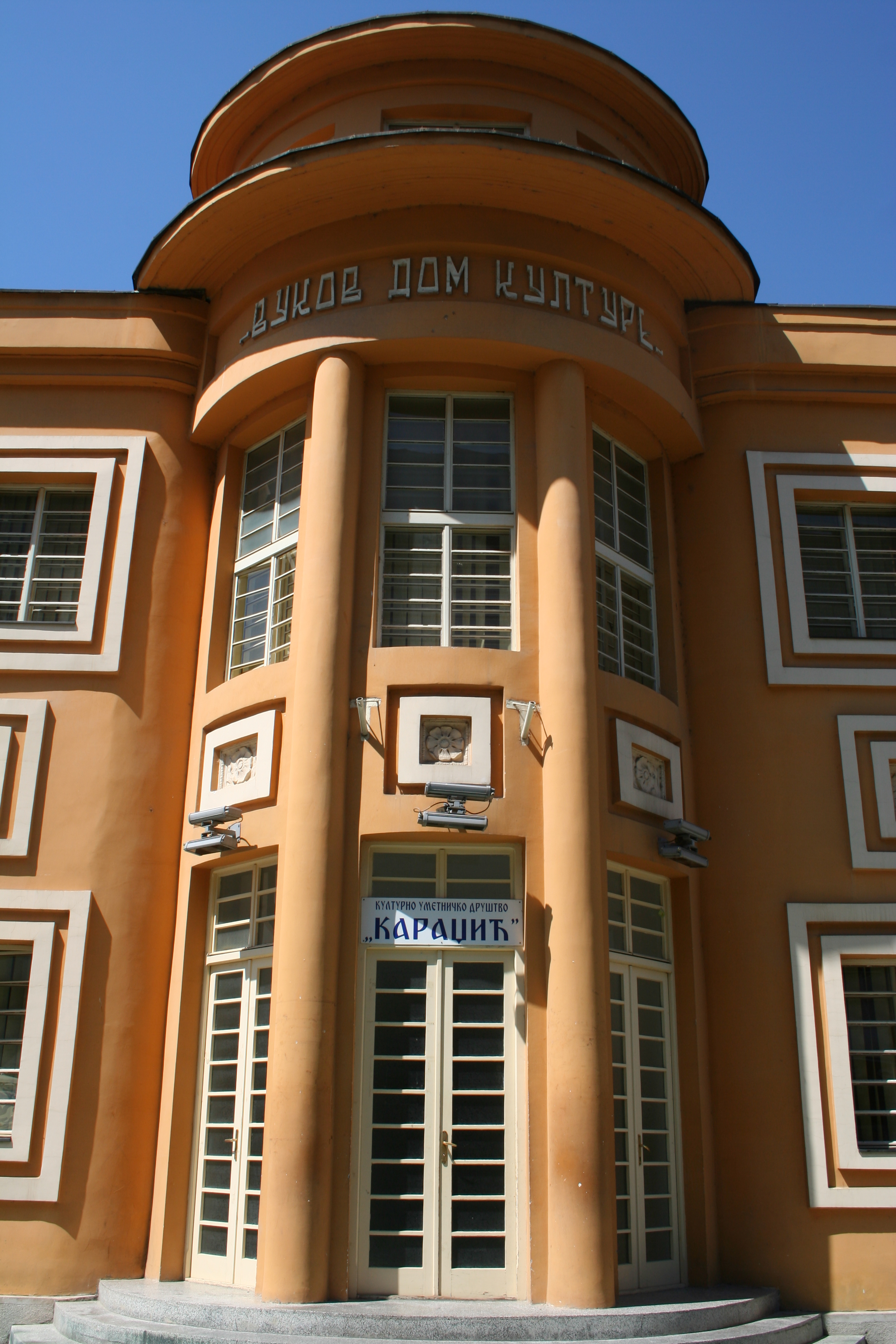 Vukov dom kulture, Loznica